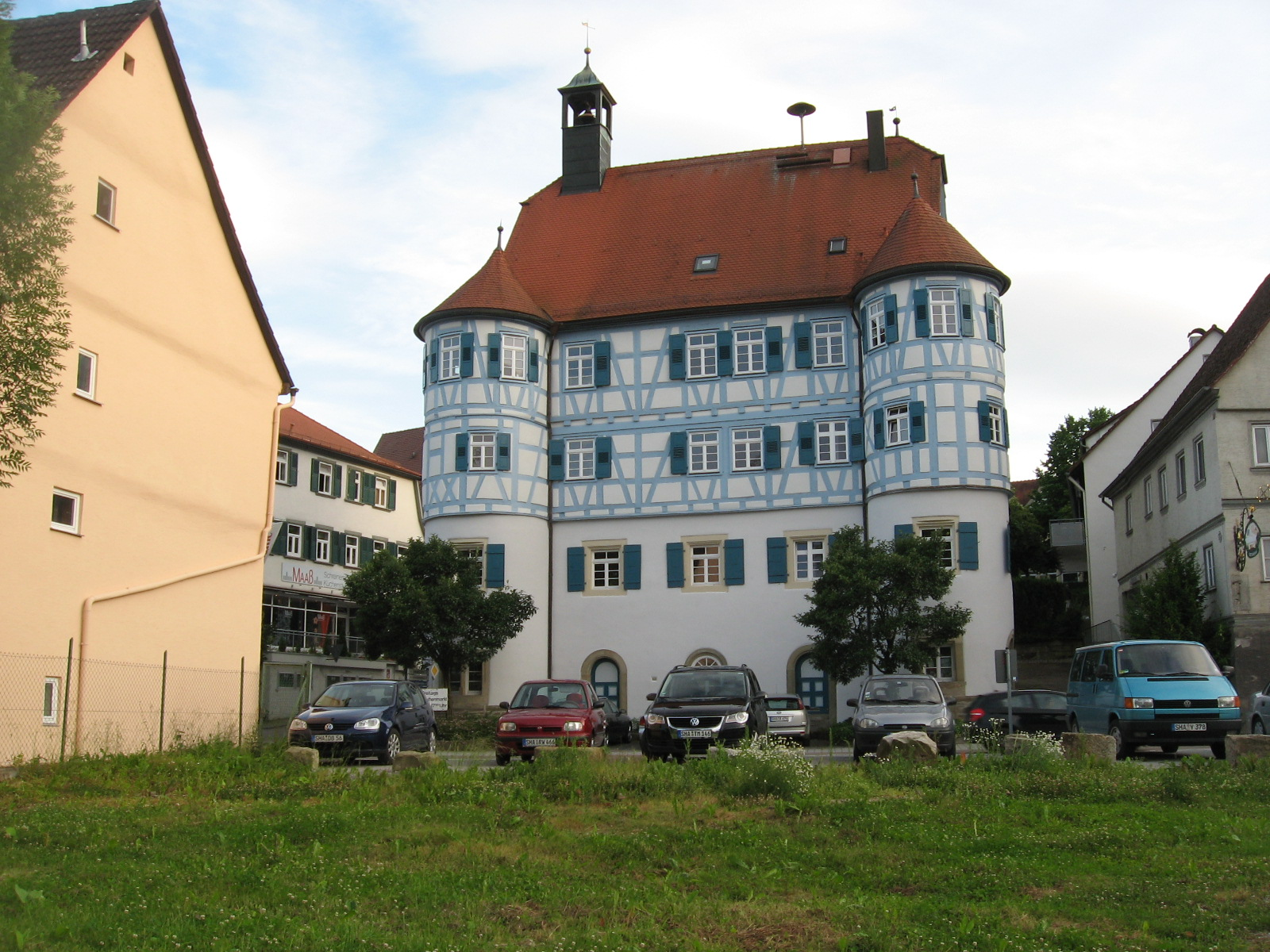 Obersontheim, Rathaus, Blick vom Bühlerufer nach SW auf die NNE-Fassade mit den zwei Ecktürmen.JPG